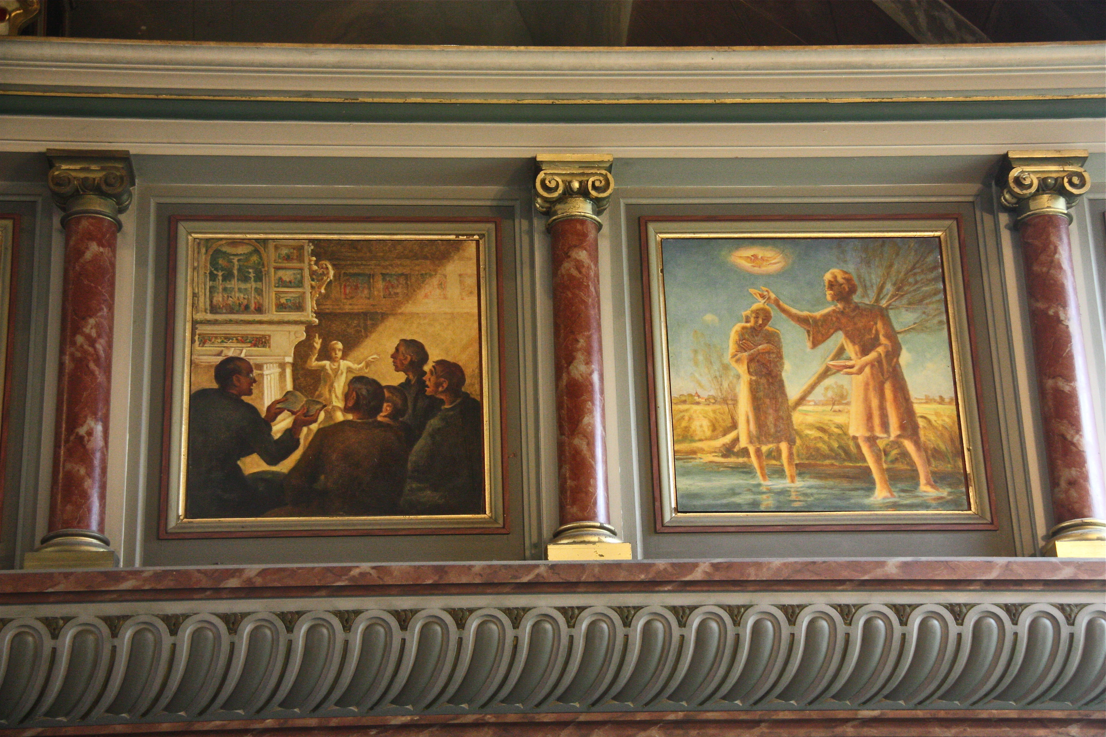 This is a photograph of an architectural monument. Hamburg, Allermöhe-Reitbrook, Dreieinigkeitskirche, Innenraum, zwei Bilder an der Orgelempore. Szene "Jesus predigt im Tempel" ist in die Allermöher Kirche verlegt, Szene "Taufe" ist vor norddeutscher Marschlandschaft dargestellt